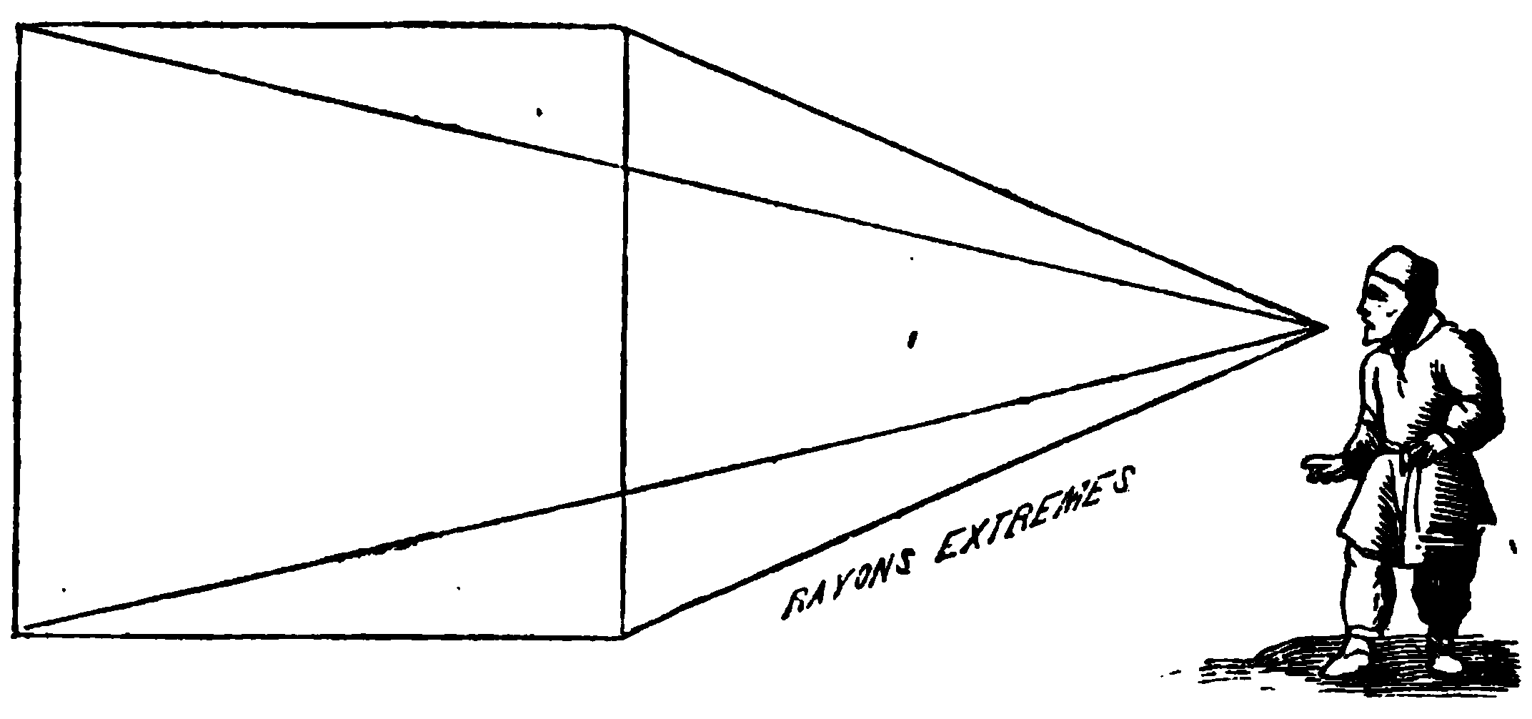 illustration pour De la peinture de Léon Battista Alberti, traduction Claudius Popelin 1868